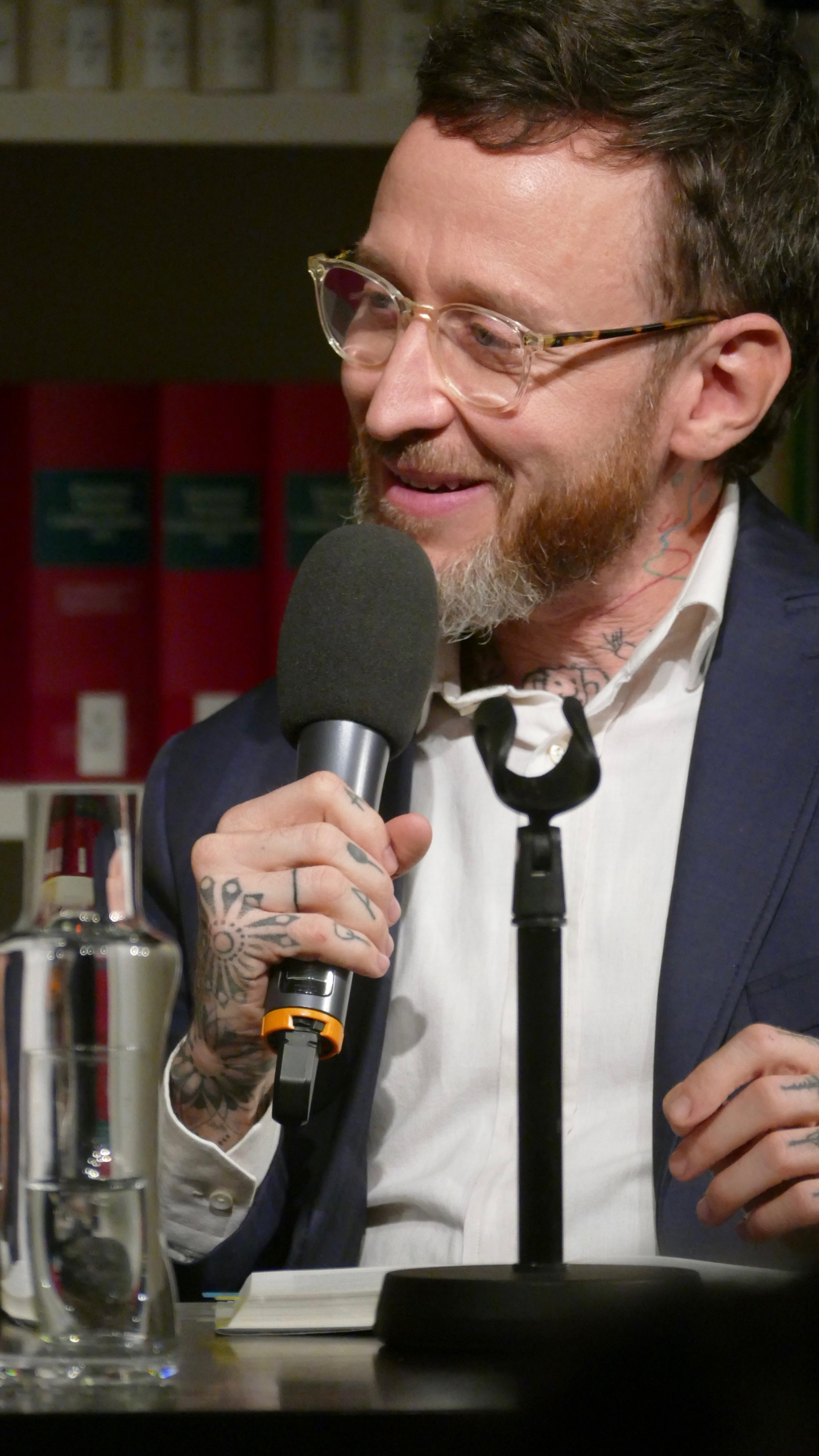 Der Schweizer Schriftsteller Thomas Meyer stellt im Literaturhaus München seinen Roman "Wolkenbruchs waghalsiges Stelldichein mit der Spionin", Zürich 2019, vor.